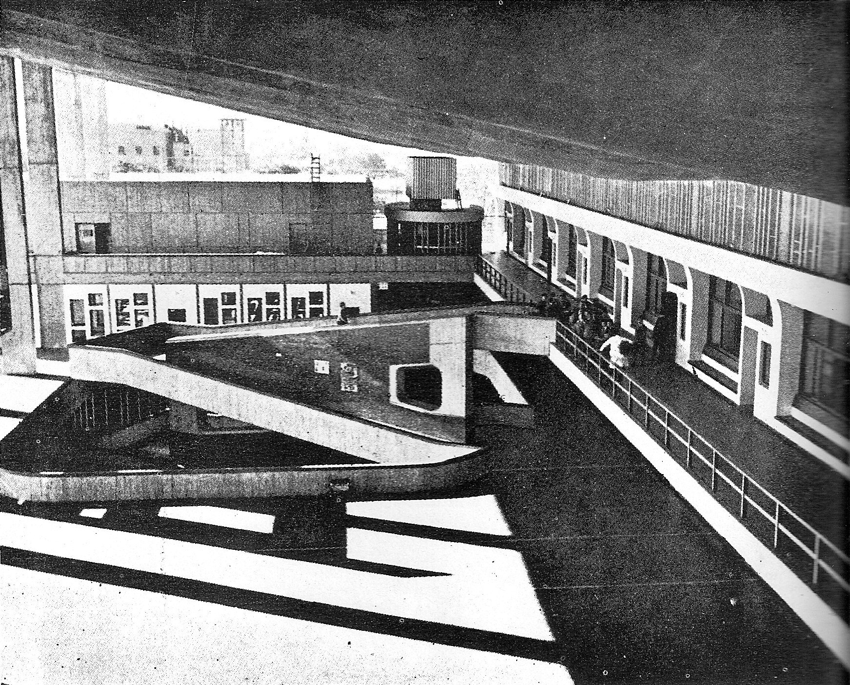 Escuela Superior de Comercio “Manuel Belgrano”, inaugurada en Córdoba (Argentina) en 1971. Vista del patio y la rampa hacia las aulas.